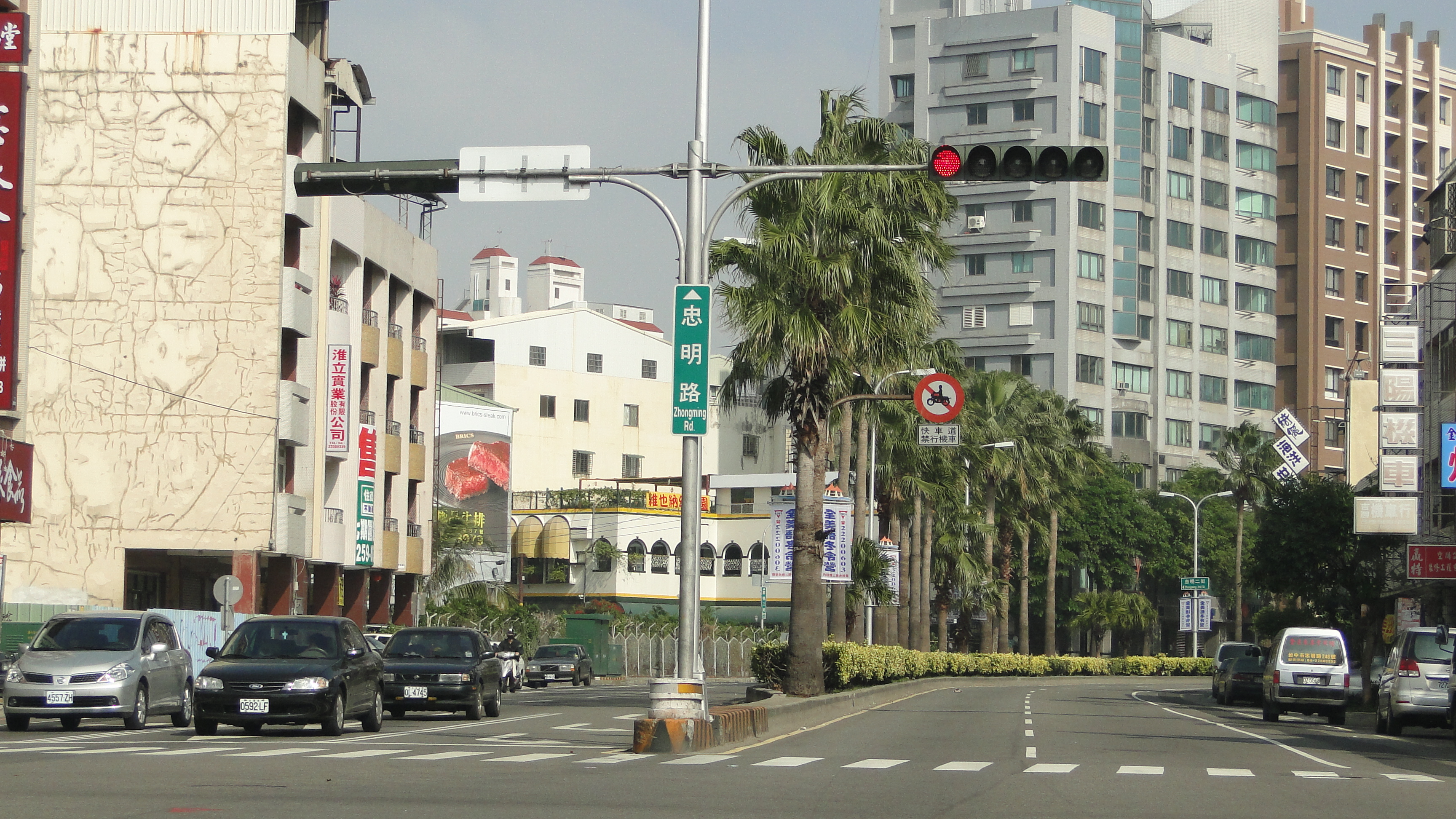 中文（台灣）: 台灣台中市忠明路一景。